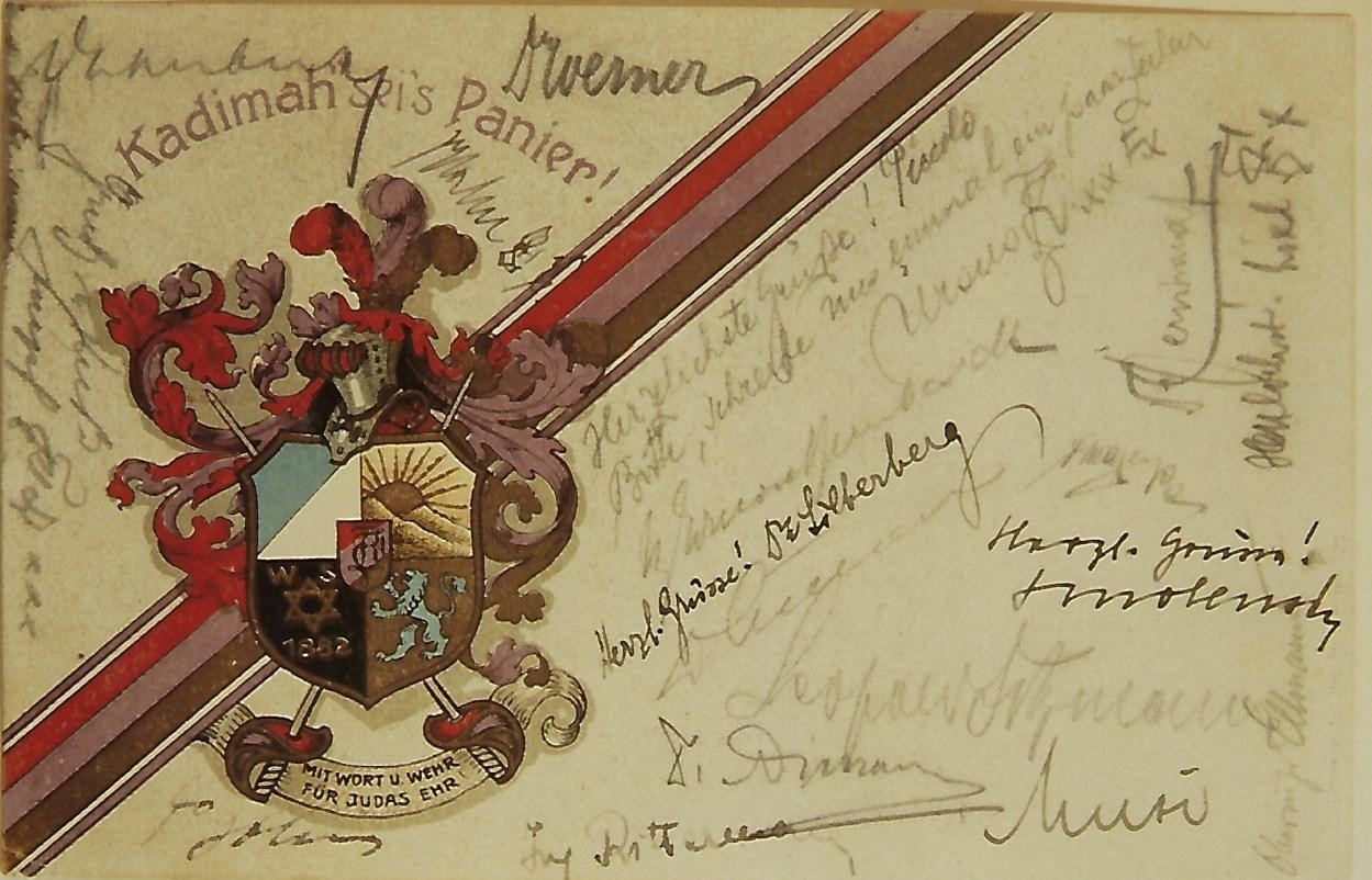 Couleurkarte der Kadimah (Studentenverbindung)